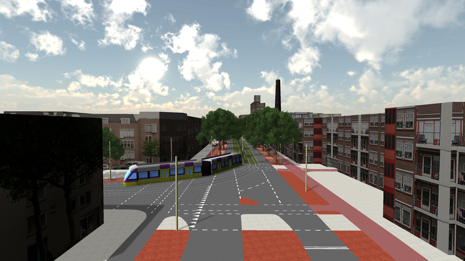 Visualisatie van de RijnGouwelijn: kruising Hooigracht-Langegracht; afbeelding van de route die de provincie Zuid-Holland met de gemeente Leiden in 2008 is overeengekomen. De afbeelding is rechtenvrij te gebruiken.